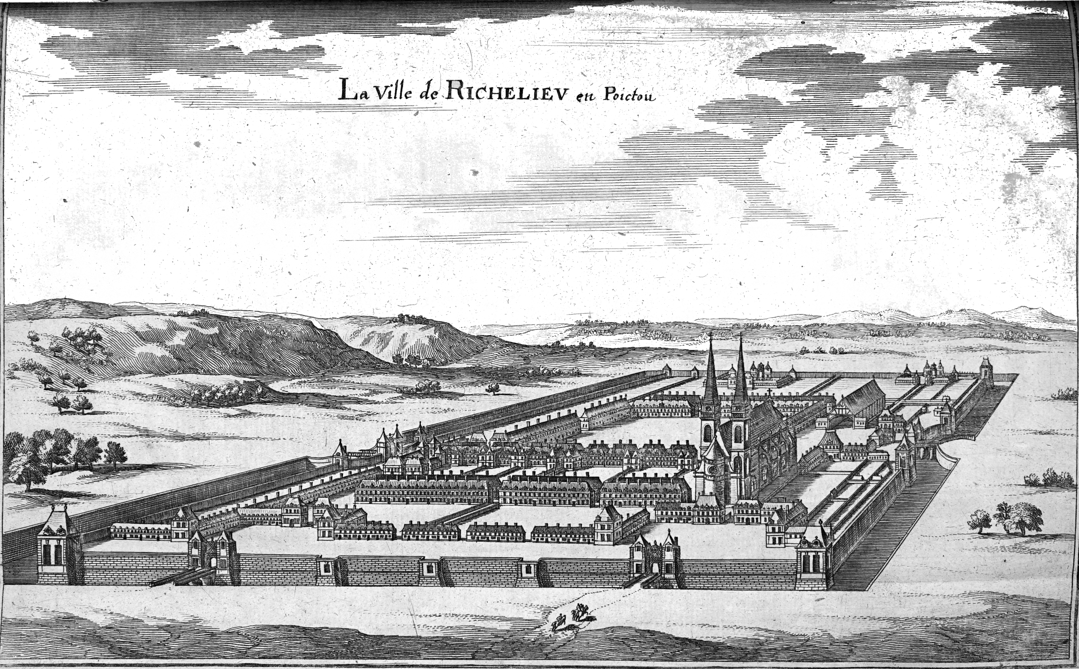 dans Topographiae Galliae.